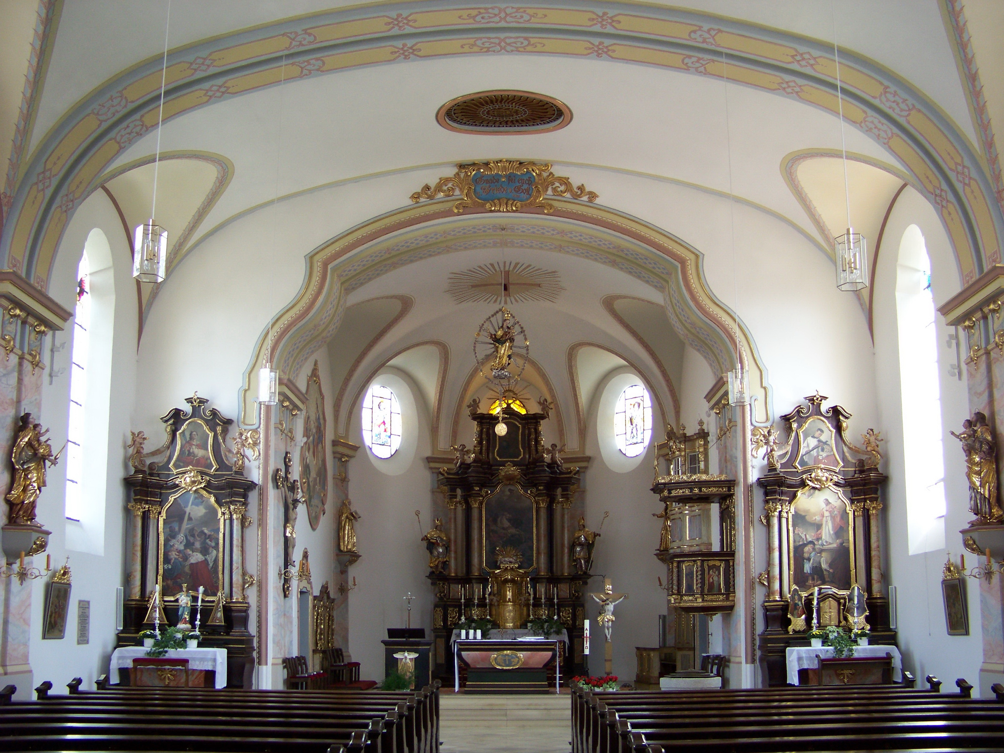 Leiblfing, Hailing, Von-Stinglhaimer-Straße 12. Katholische Filialkirche St. Pauli Bekehrung. Einheitlicher Neubau 1913 durch Heinrich Hauberrisser. Das Langhaus ist mit einer korbbogigen Tonnendecke mit Stichkappen gedeckt. Das Langhaus geht mit einem Karniesbogen zum Chor über. Der eingezogene Chor schließt mit drei Seiten eines Achtecks und wird von zwei Ovalfenstern mit Stichkappen erhellt.